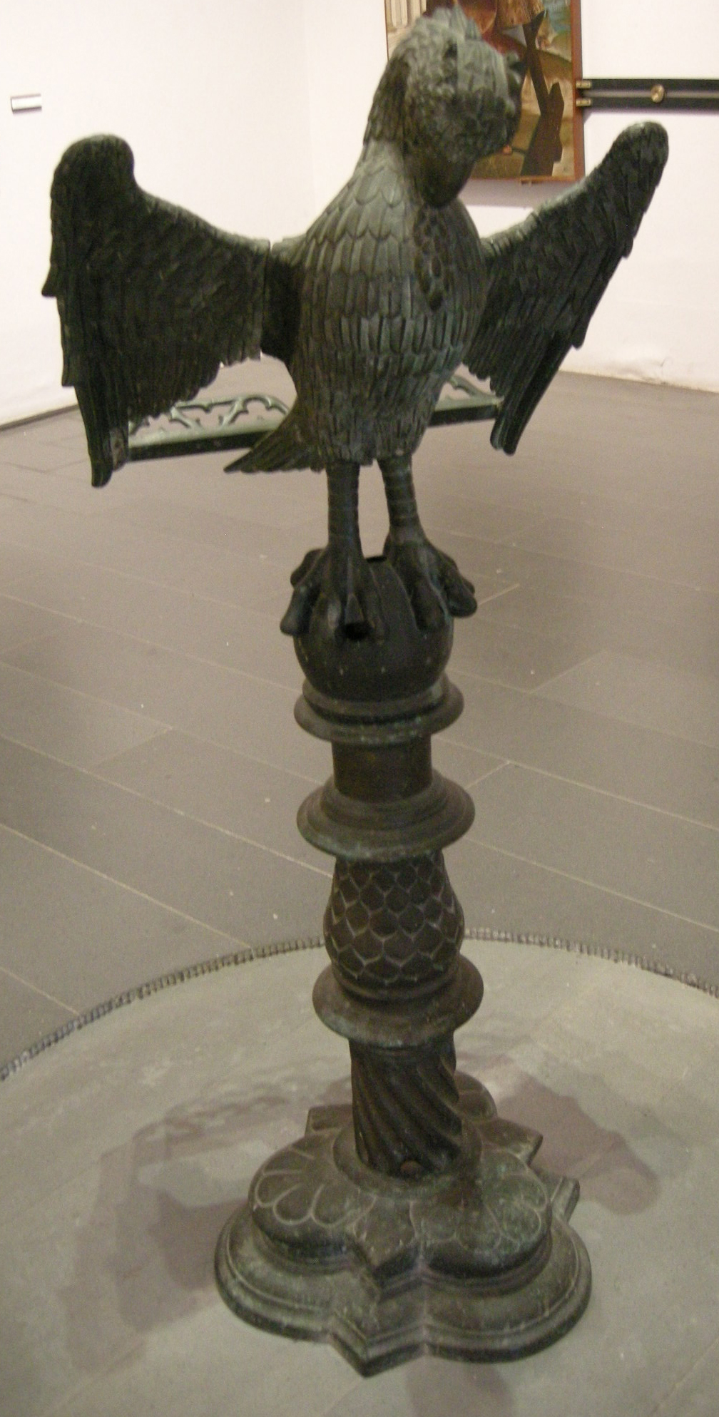 Museo regionale di messina, leggio a forma di pellicano, di scuola renana, xvi sec.